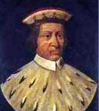 Dipinto del doge Doge Giano I di Campofregoso